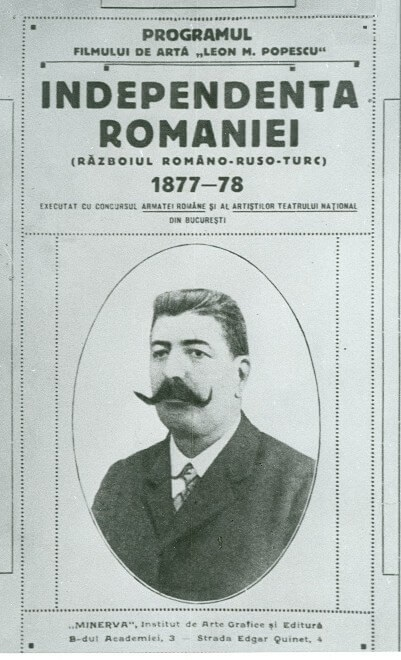 Program for Independenţa României film (1912)